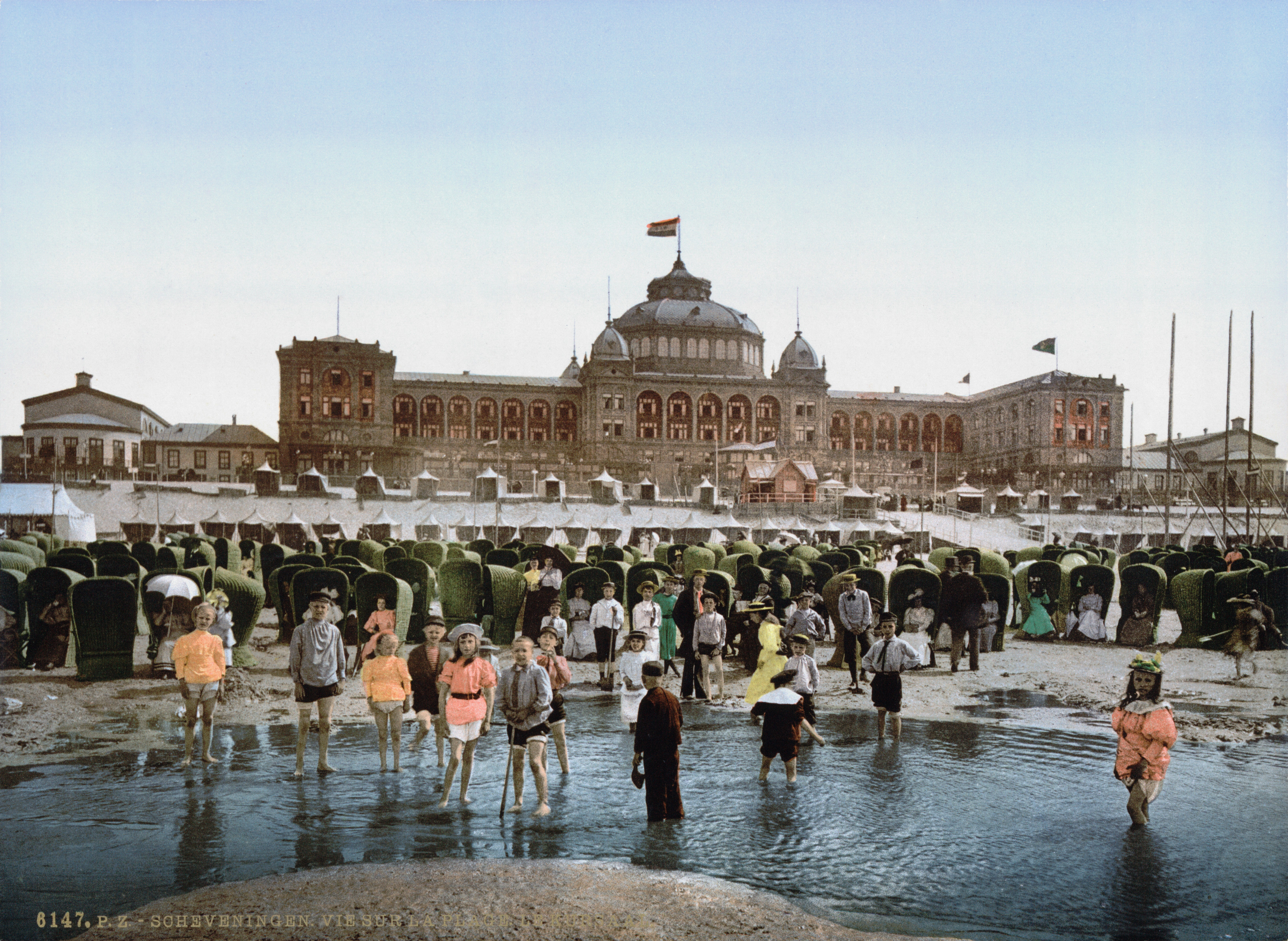 Scheveningen - Het strand en het Kurhaus